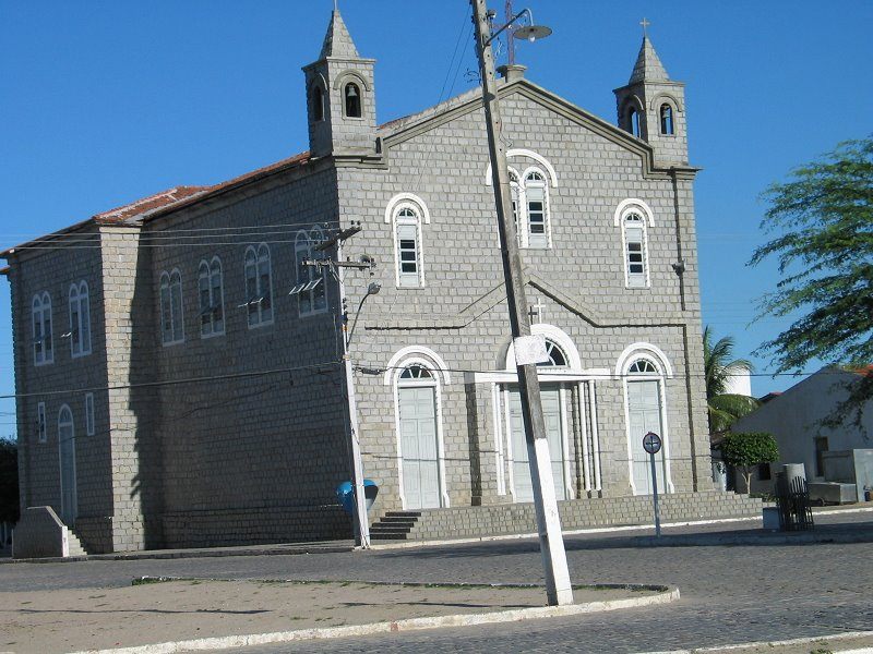 Igreja Matriz de Santa Luzia, Santaluz, Bahia.